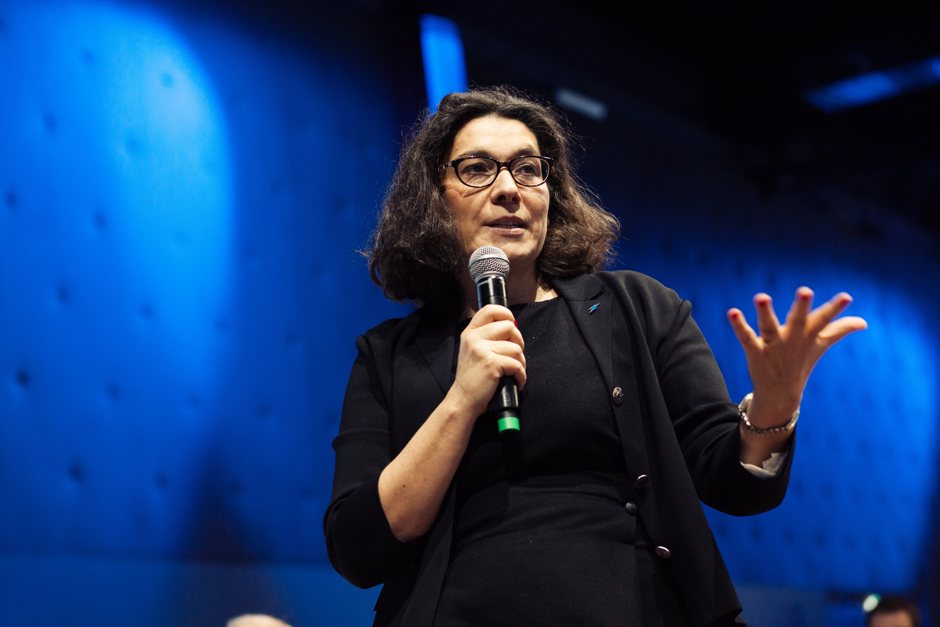 Prise de parole de Nathalie Collin lors d'une convention La Poste le 01/04/2016